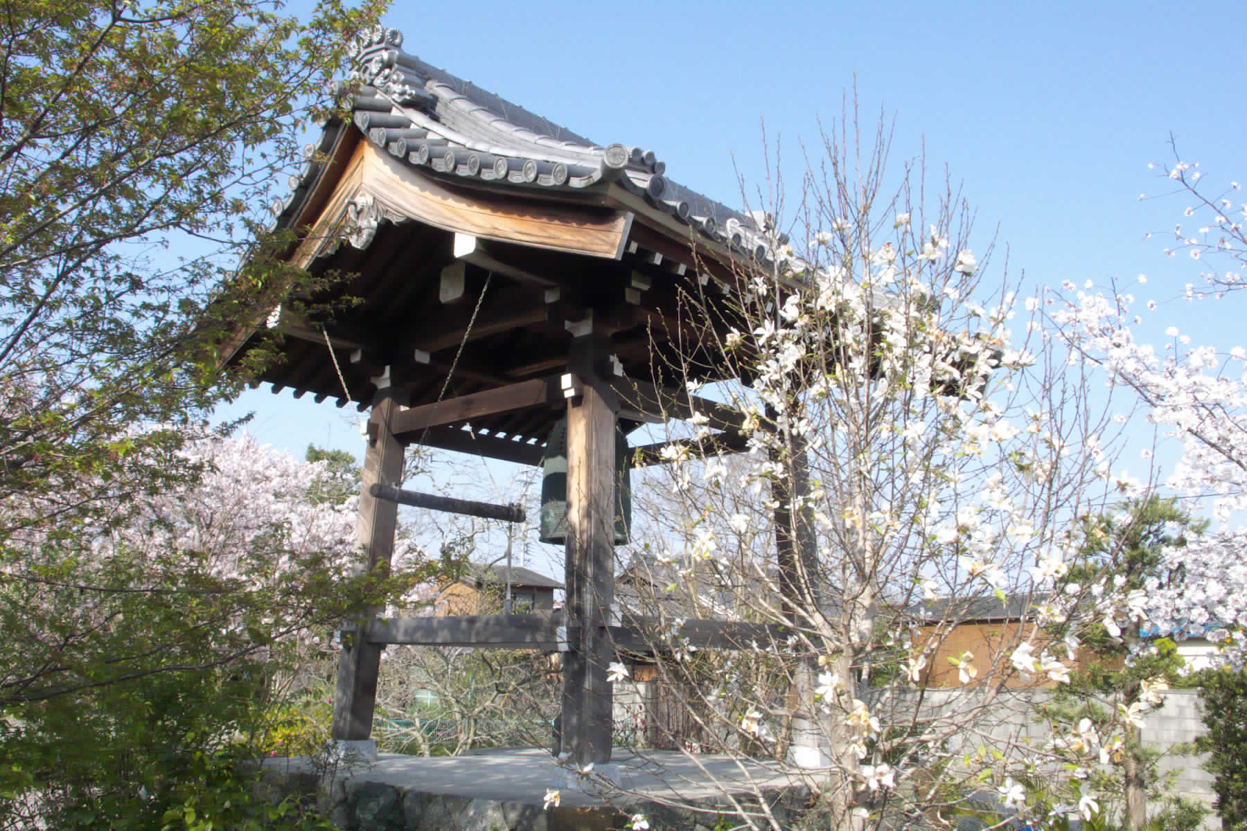 Koumyouji temple at Ise, Mie, japan.